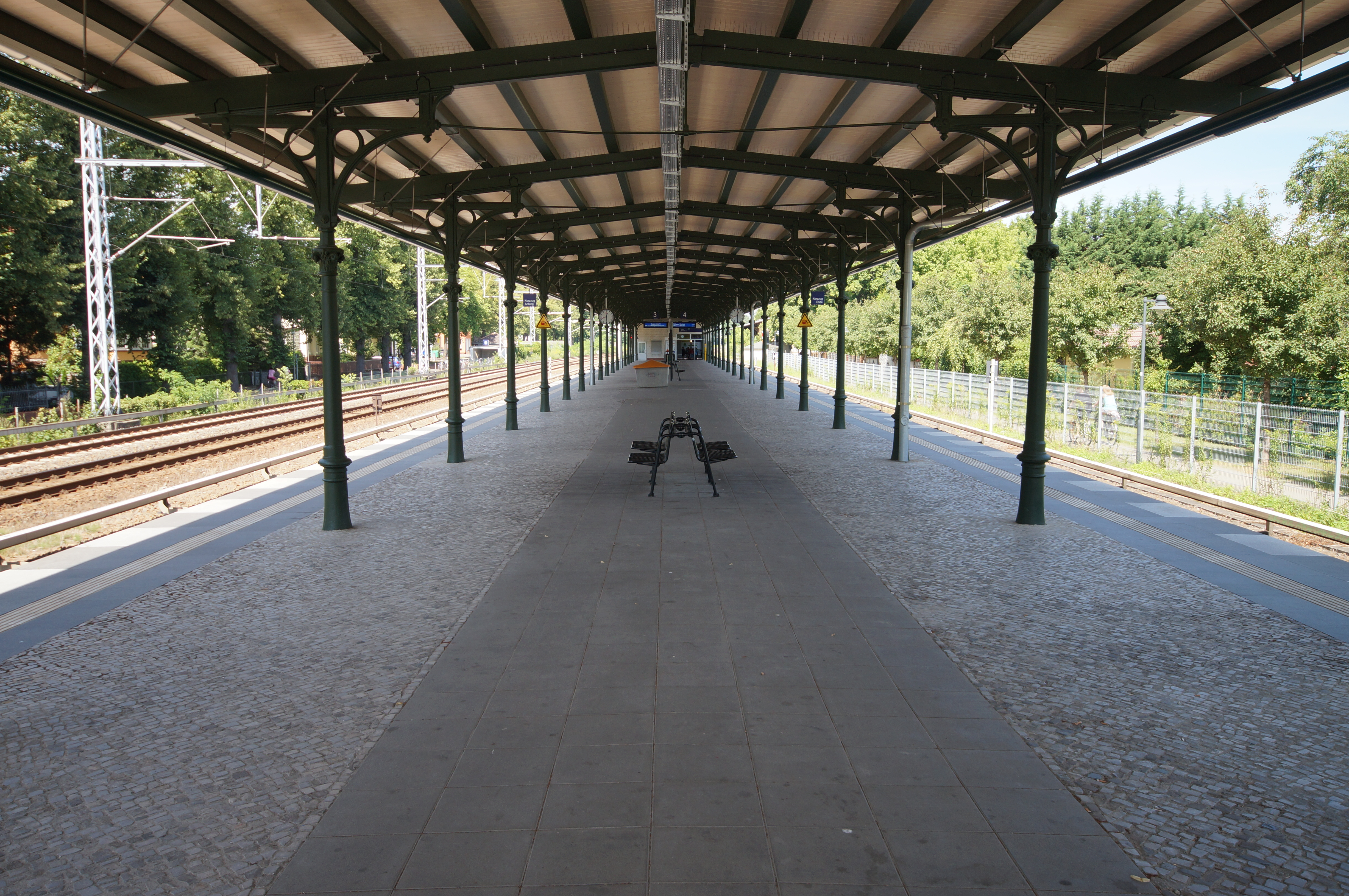 Der Bahnsteig des Zeuthener Bahnhofs